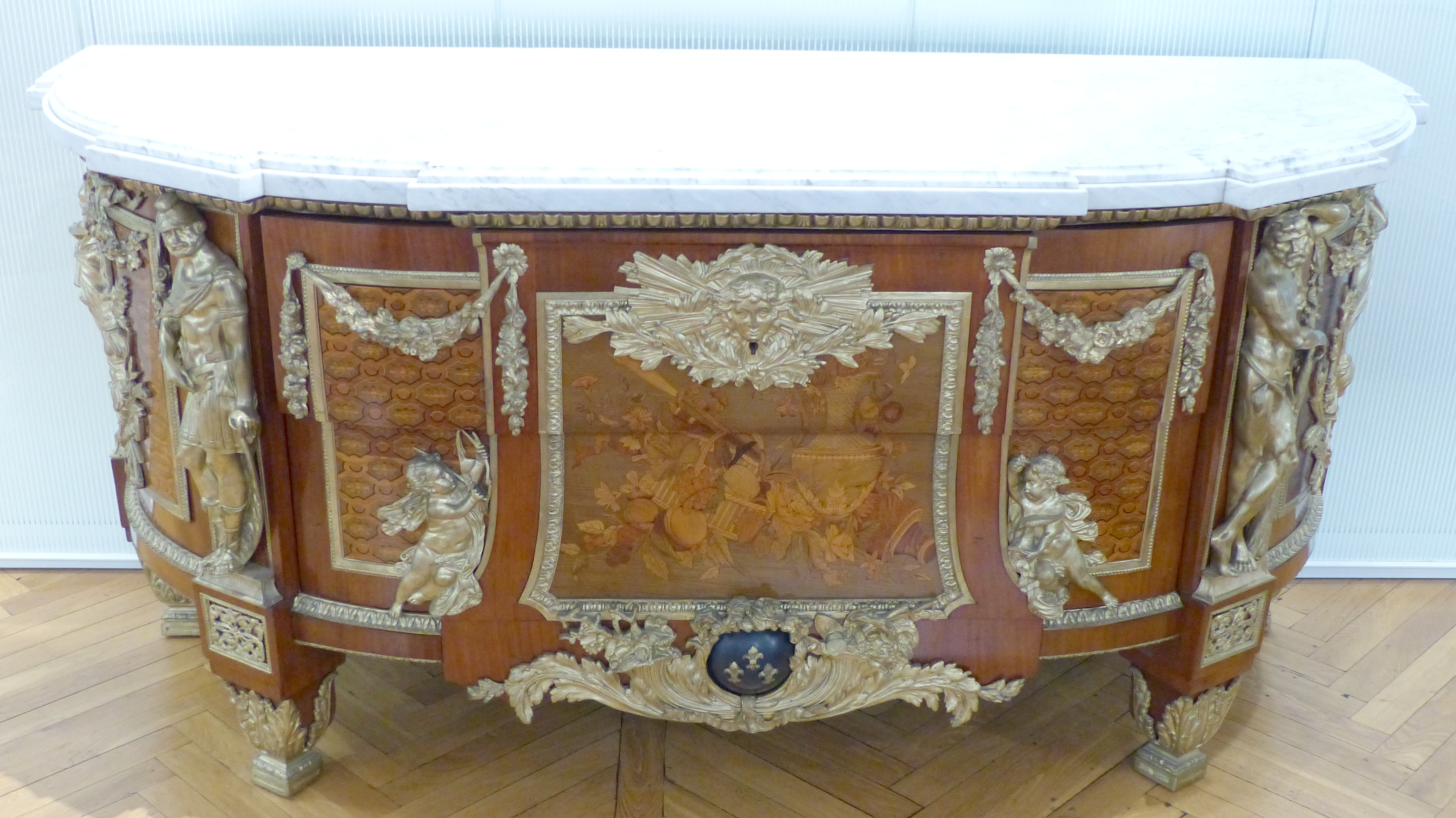 Nice (Alpes-Maritimes, France), sur la promenade des Anglais, la Villa (palais plutôt) Masséna, siège du musée du même nom. Commode signée par Guillaume Grohé et ornée de bronzes dorés figurant de gauche à droite : la Tempérance, Mars, Hercule et la Prudence. Vers 1862-1865, réplique de la commode de Jean-Henri Riesener pour la chambre de Louis XVI à Versailles en 1775.